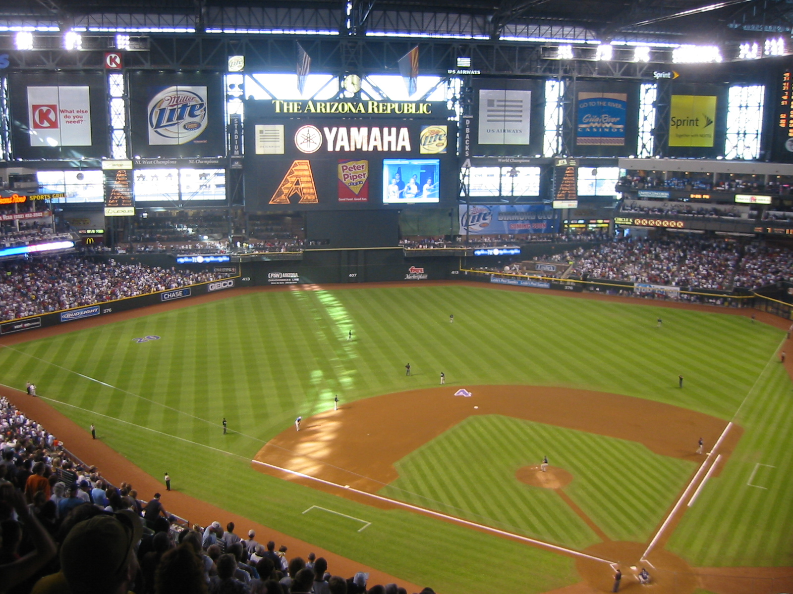 Intérieur du Chase Field